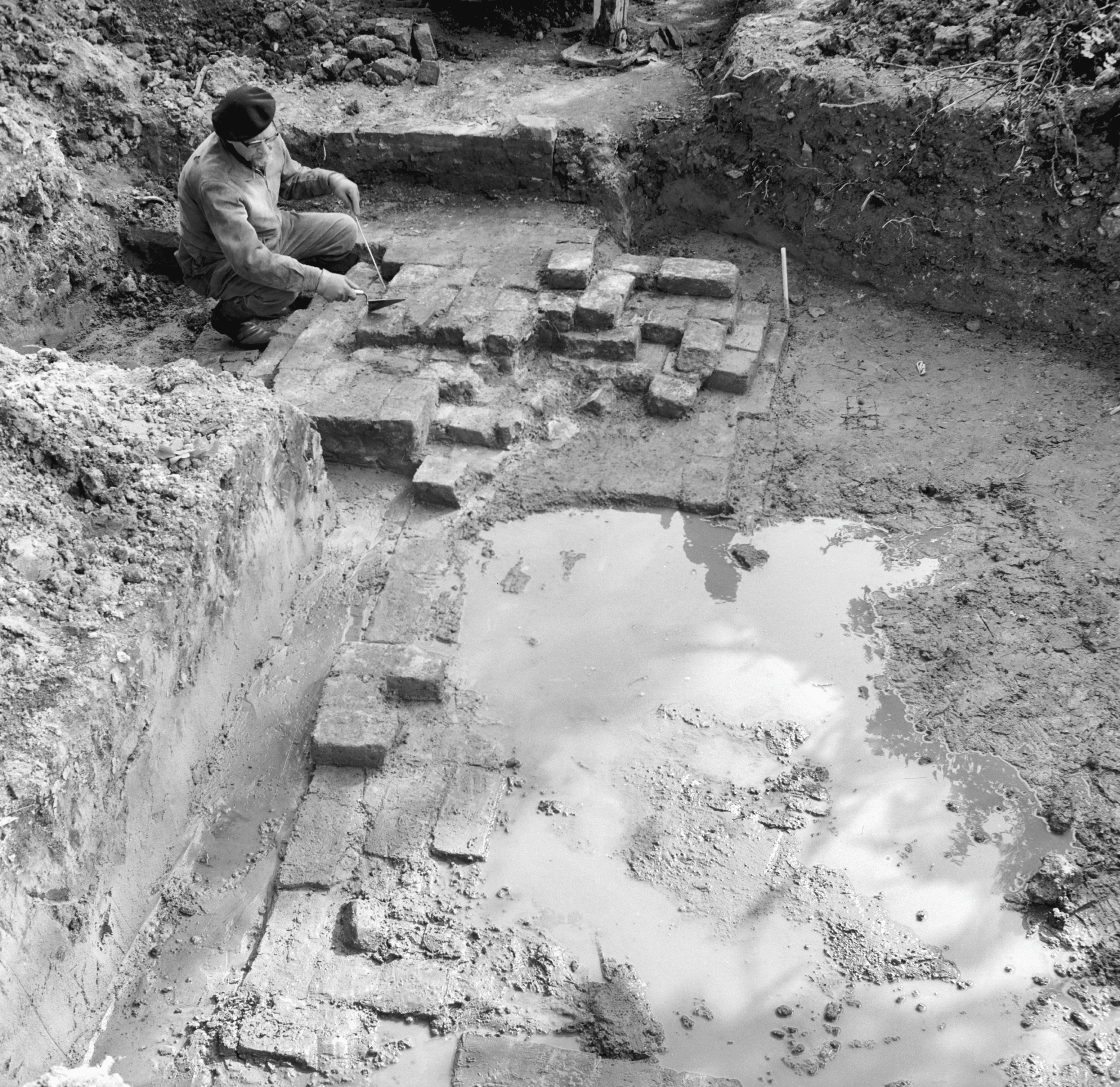 voormalig Huis Steenvoorde, opgraving fundering